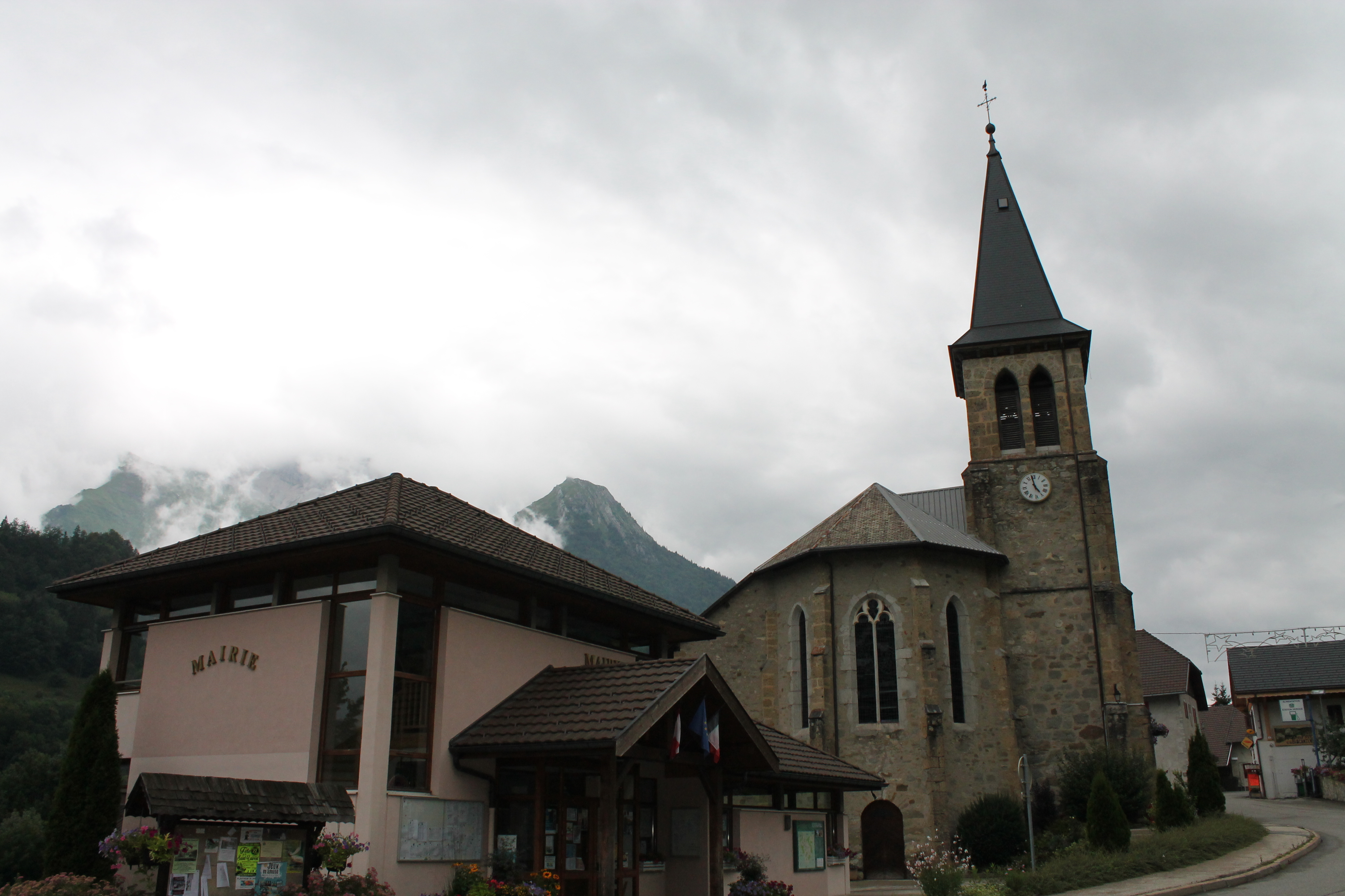 Mairie et église Saint-Maurice de Serraval (1864)